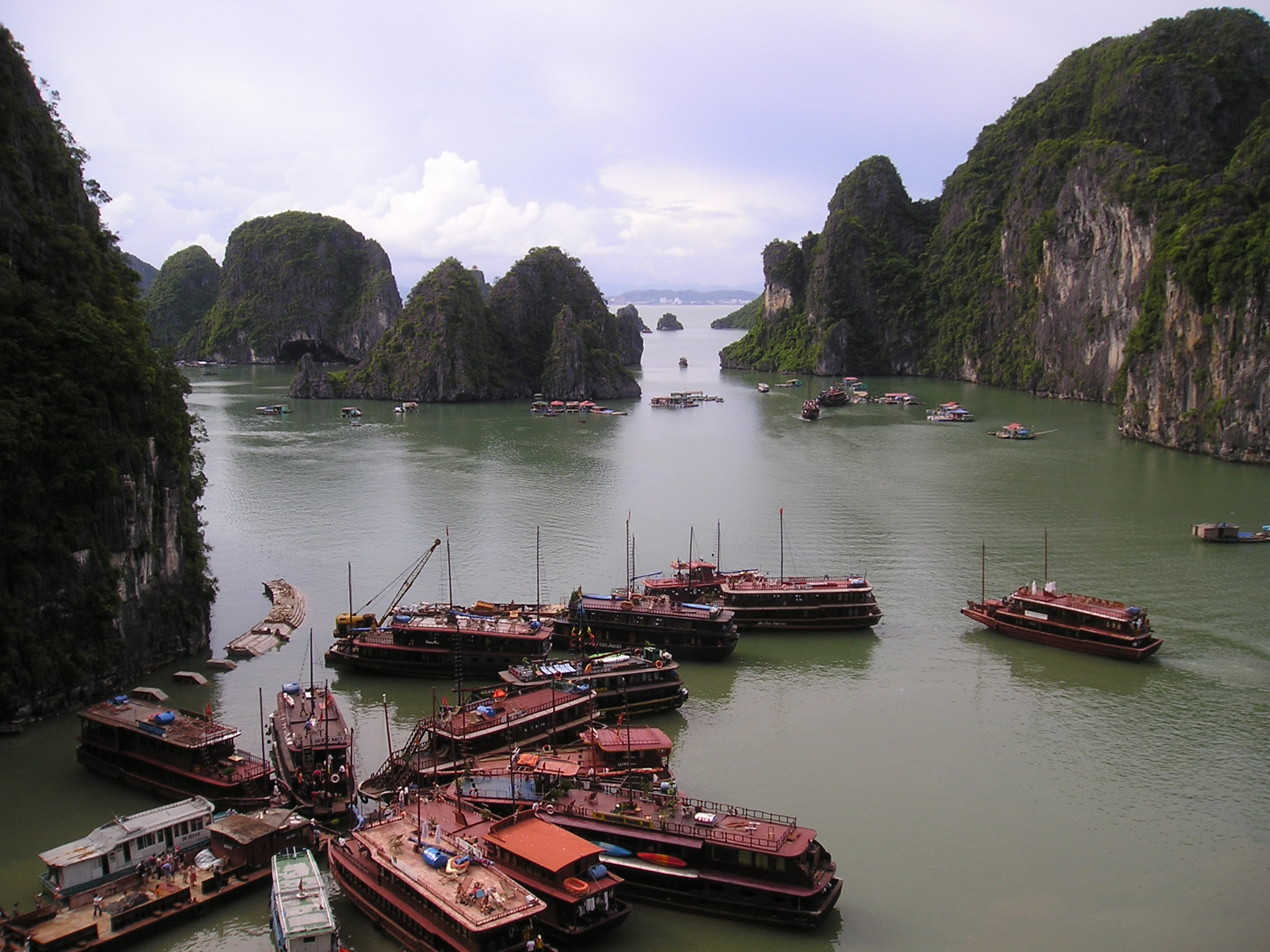 boats in Ha Long Bay, Vietnam